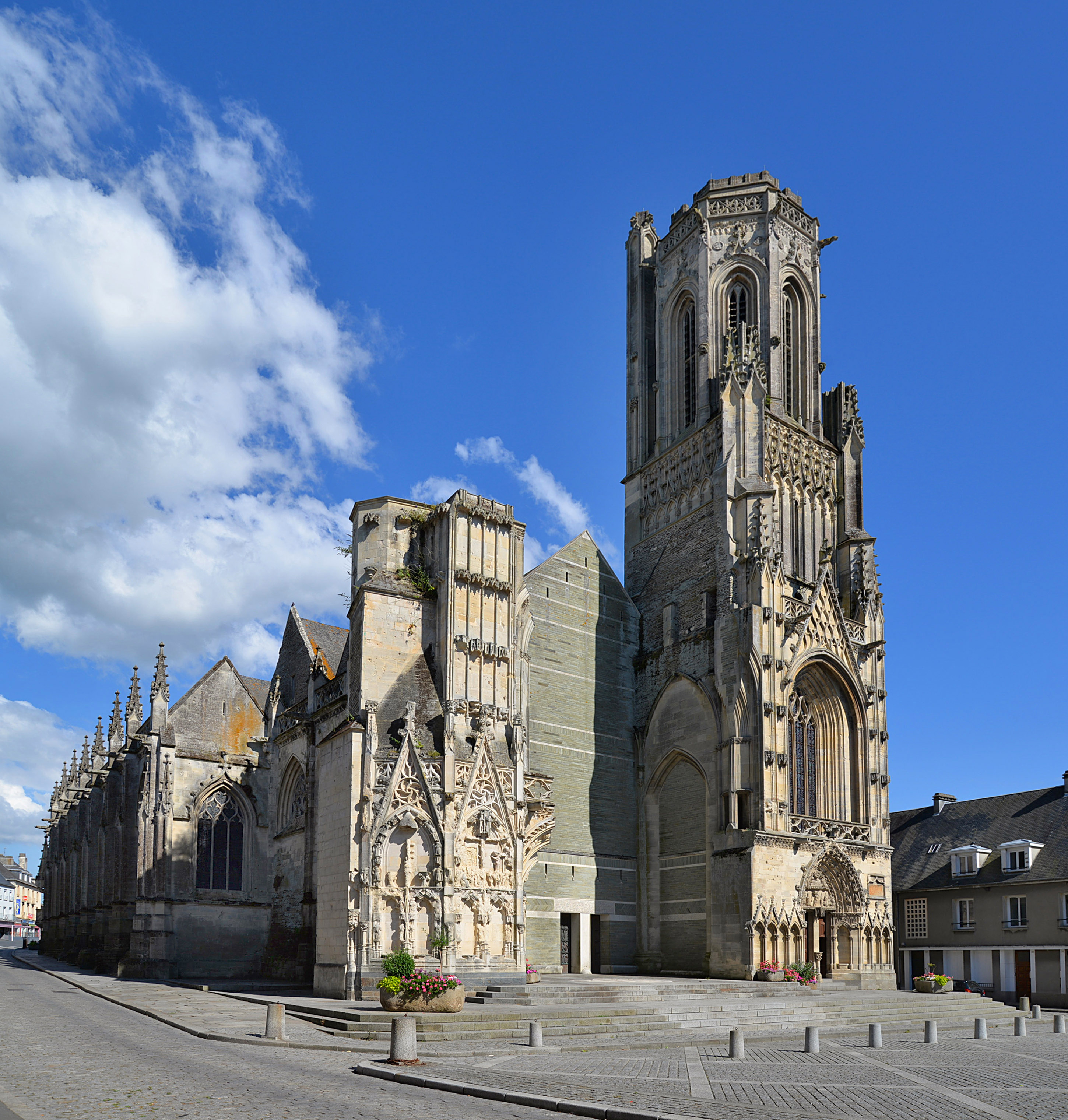 Saint-Lô (Manche)